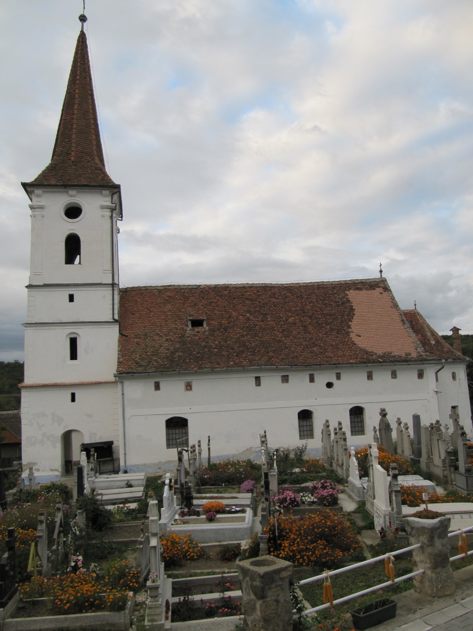 Biserica Sfânta Treime din Sibiel